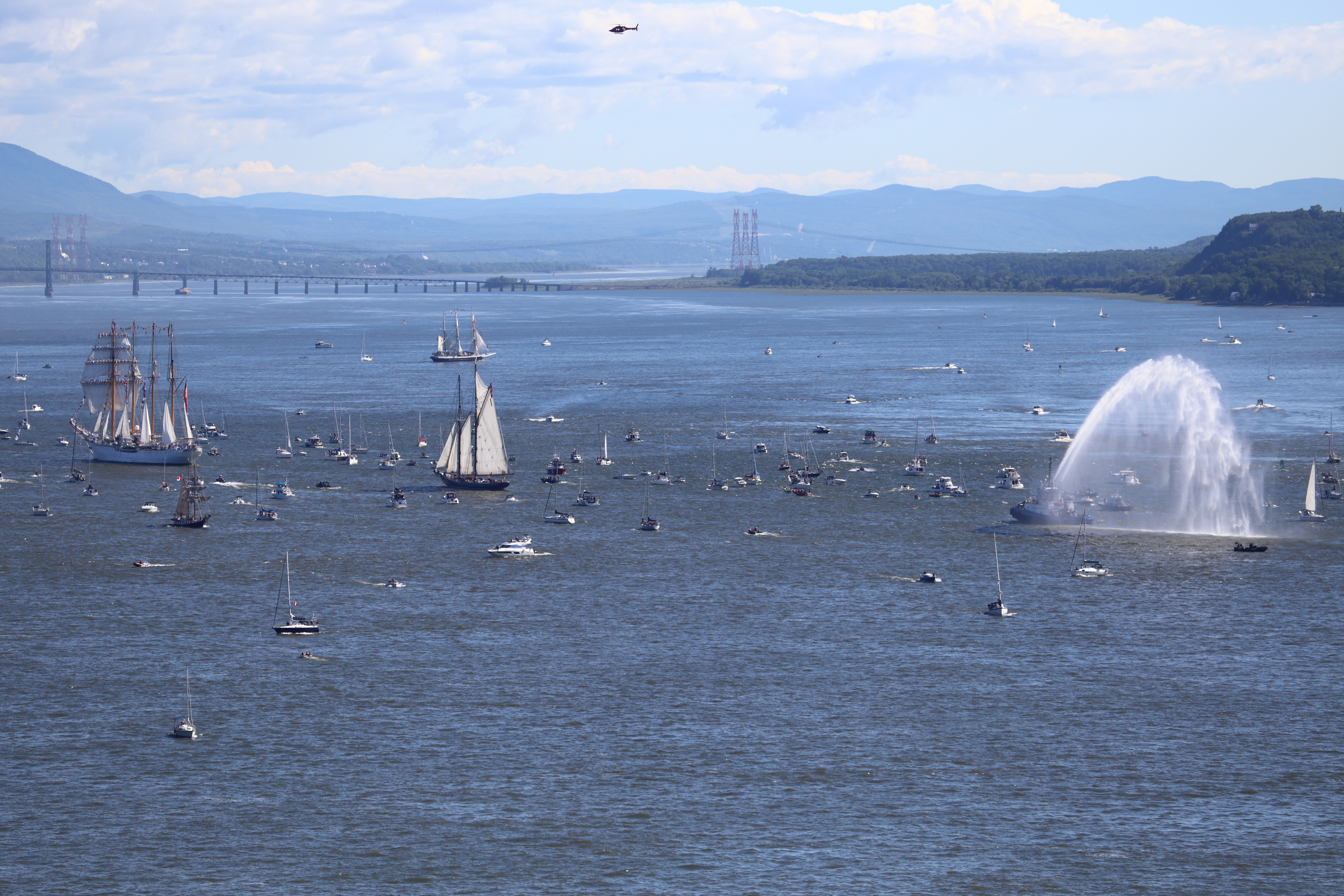 Course de grands voiliers Rendez-vous 2017, à Québec.